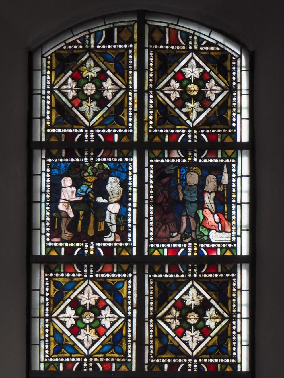 Coswig (Anhalt),St. Nicolai, Mittelalterliche Bleiverglasung, Foto: Juni 2015